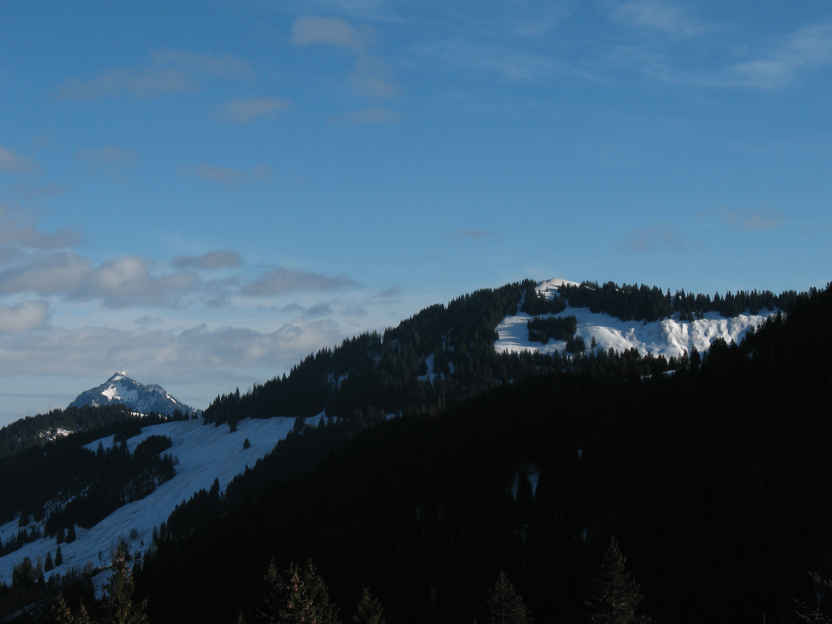 Grünten] (1738 m).